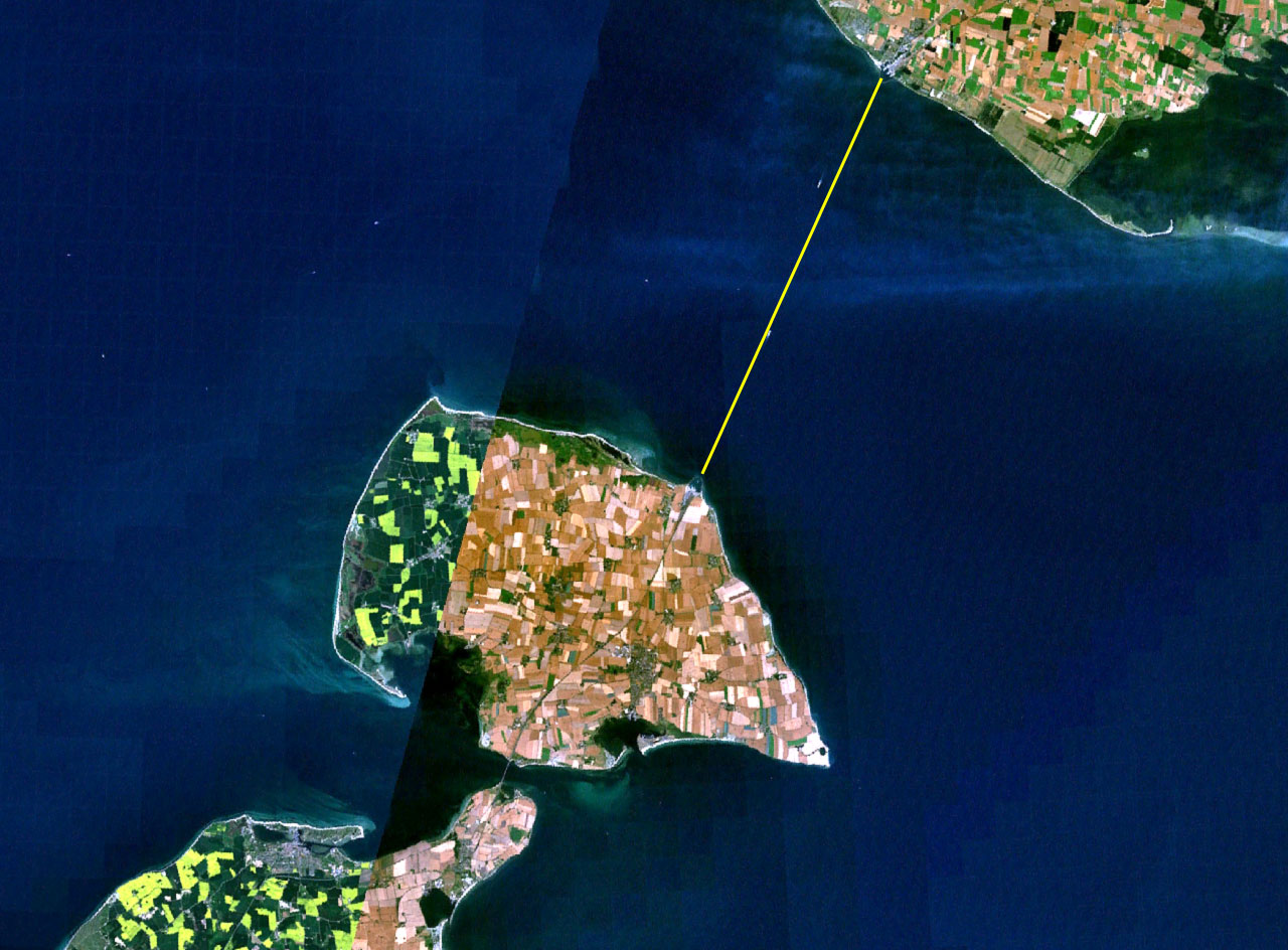 Satellitenaufnahme Vogelfluglinie Fehmarn - Dänemark (Puttgarden - Rødby) mit Schiffsroute